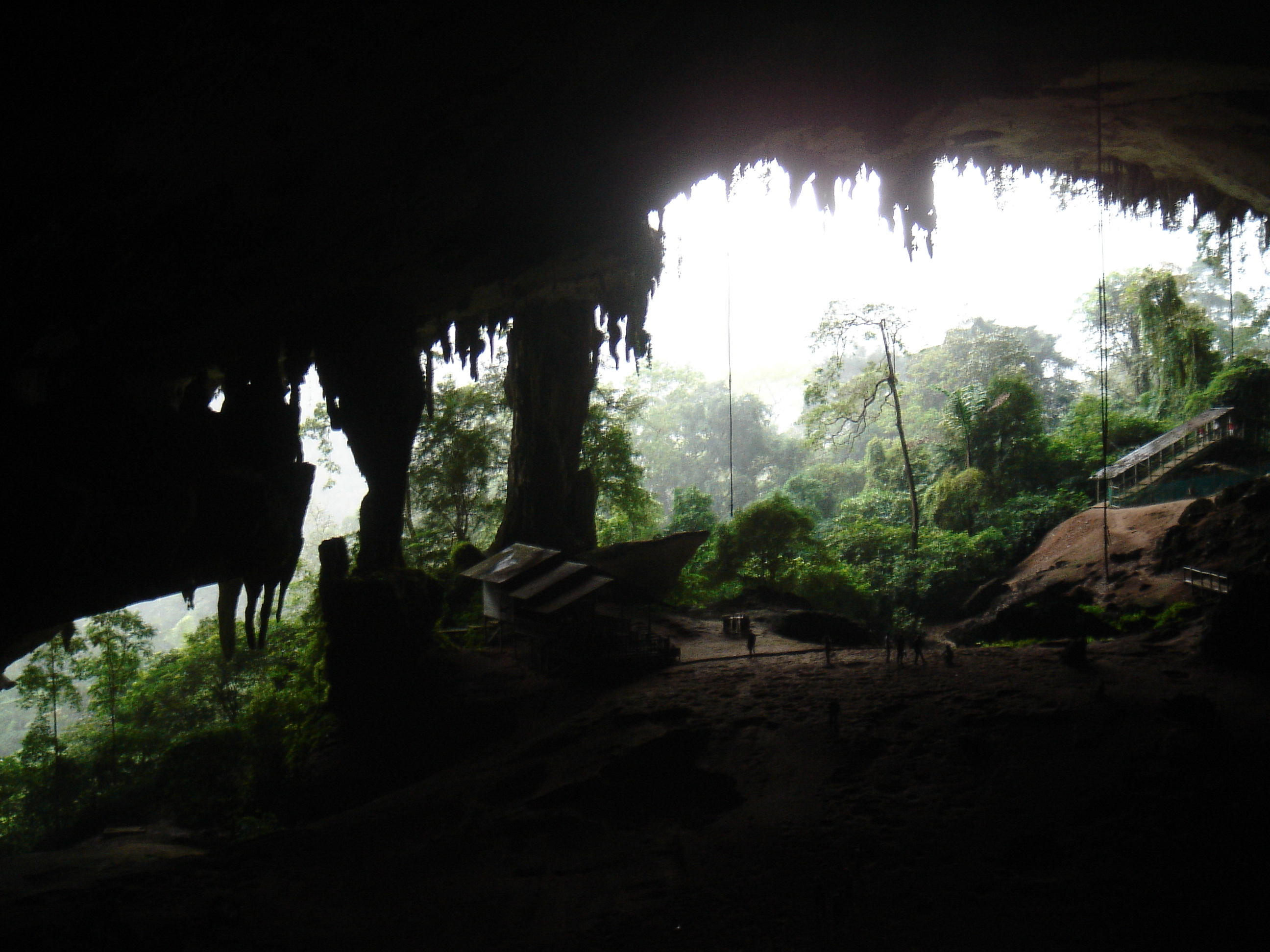 Niah Caves National Park, Miri, Sarawak, East Malaysia.